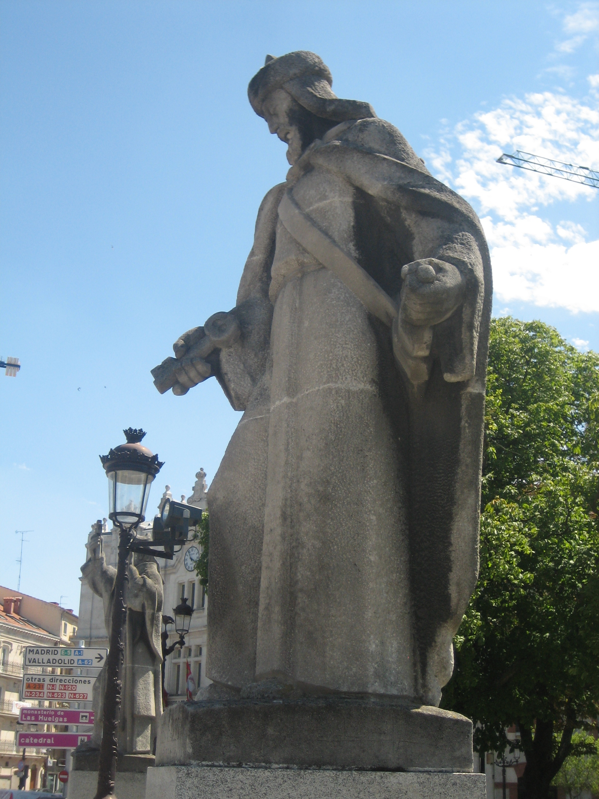 Estatua de Ben Galbón, obra de Joaquín Lucarini